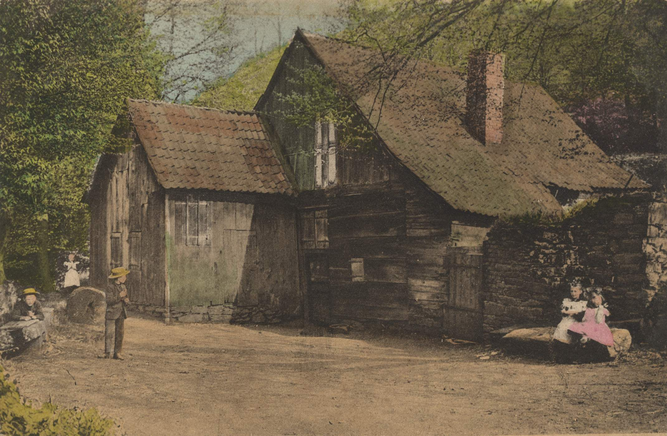 Gebäudeansicht